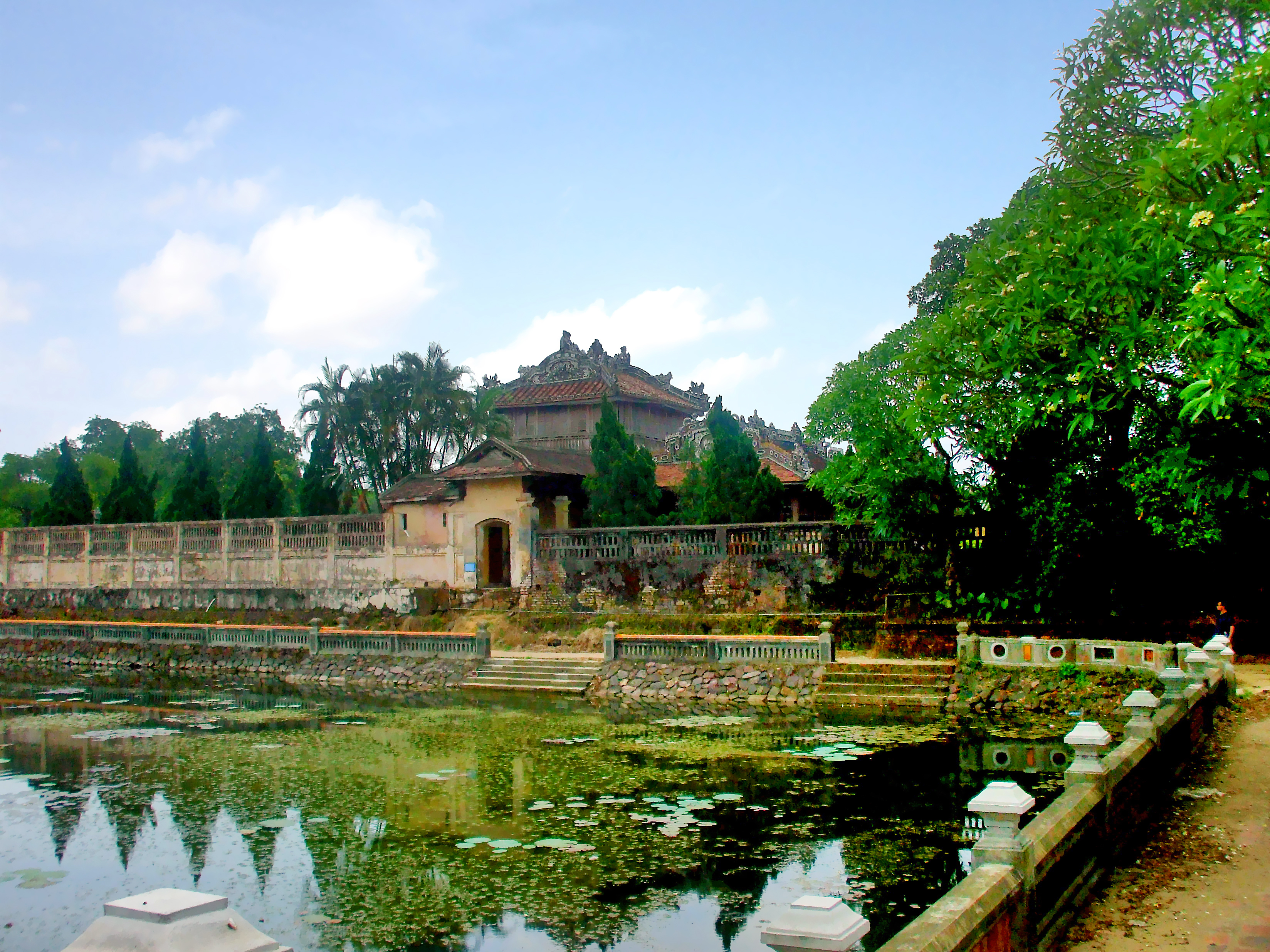 Phong cảnh tại Thái Bình Lâu trong Tử Cấm Thành (Huế, Việt Nam).